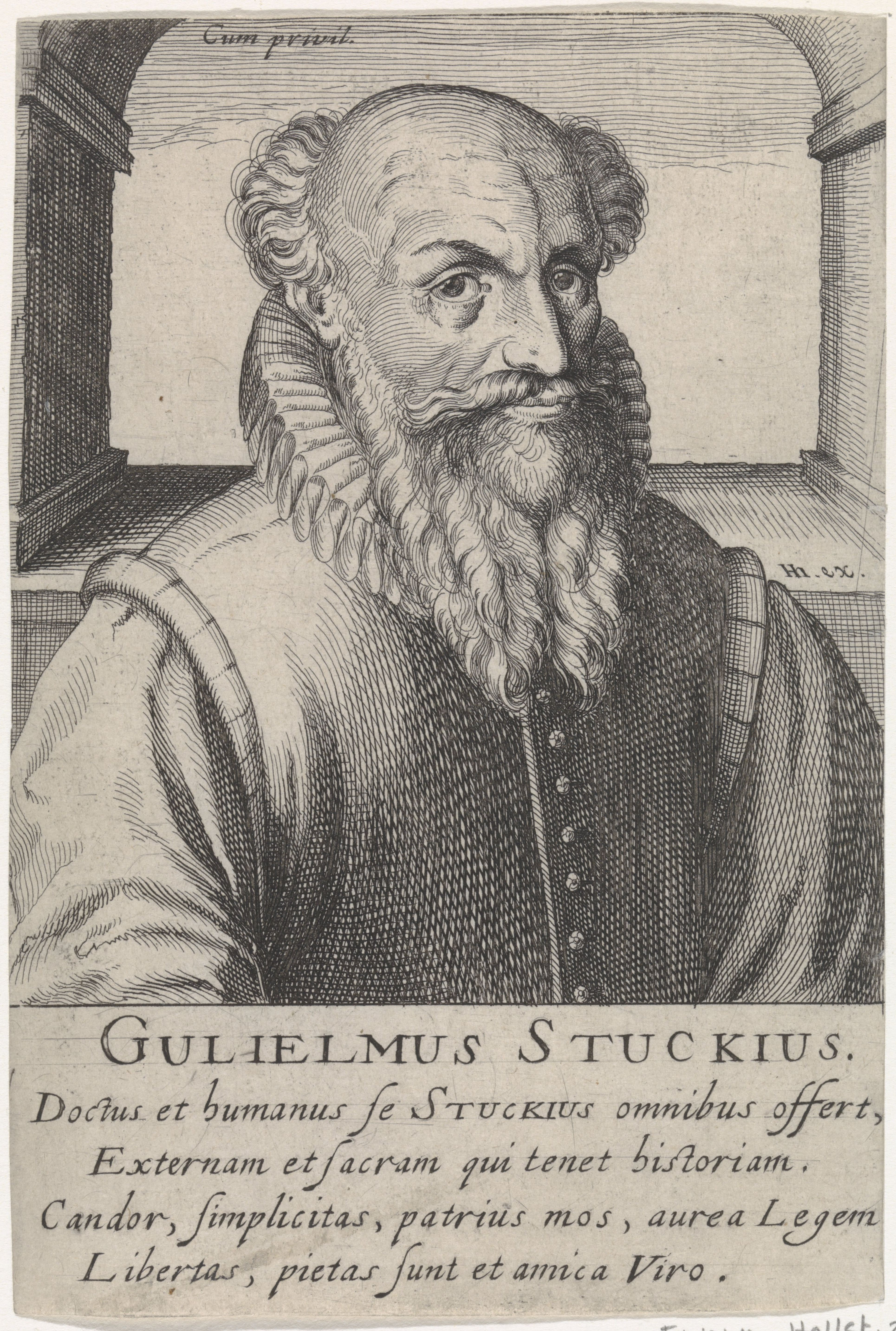 IdentificatieTitel(s): Portret van Johann Wilhelm StuckBeroemde hervormers (serietitel)Effigies praestant. aliquot virorum qui veram in primis religion (serietitel)Objecttype: prent Objectnummer: RP-P-1908-2657Catalogusreferentie: Hollstein Dutch 27New Hollstein Dutch 199-1(2)Opschriften / Merken: verzamelaarsmerk, verso, gestempeld: Lugt 2228Omschrijving: Buste naar rechts van Johann Wilhelm Stuck. Onder het portret zijn naam en vier regels in het Latijn. Prent uit het later toegevoegde deel 2 (28 prenten) van de serie portretten van beroemde hervormers door Hendrick Hondius uit 1599.VervaardigingVervaardiger: prentmaker: Simon Frisiusuitgever: Hendrick Hondius (I) (vermeld op object)verlener van privilege: onbekend (vermeld op object)Plaats vervaardiging: Den HaagDatering: ca. 1610Fysieke kenmerken: etsMateriaal: papier Techniek: etsenAfmetingen: plaatrand: h 161 mm × b 109 mmOnderwerpWie: Johann Wilhelm StuckiVerwerving en rechtenVerwerving: aankoop 1905Copyright: Publiek domein